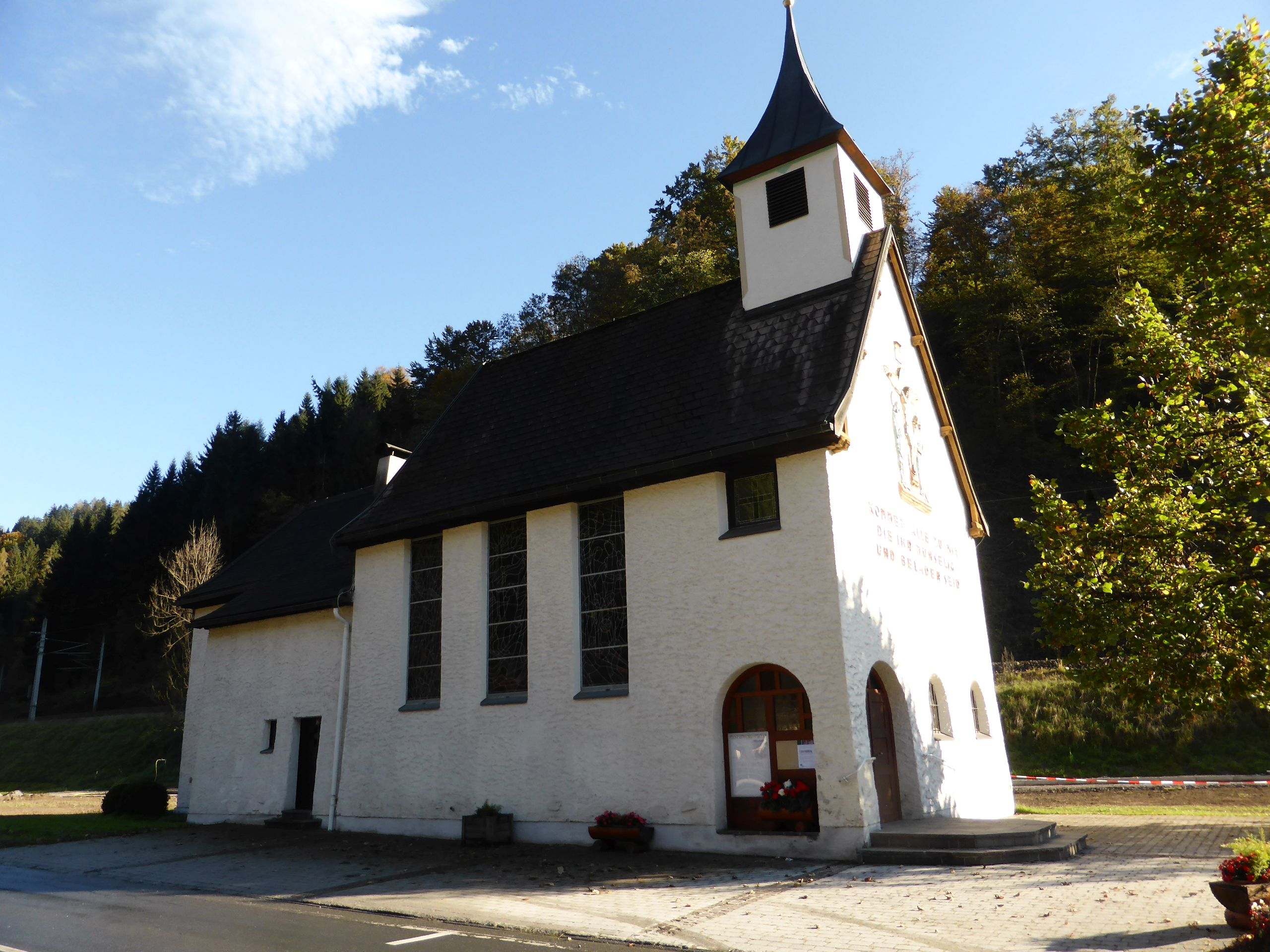 Kath. Filialkirche Mariae Himmelfahrt in Pöham